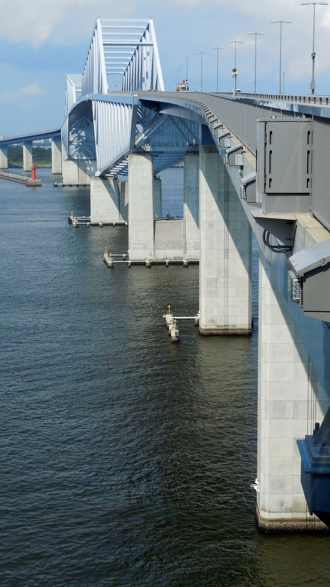 中央防波堤側より撮影